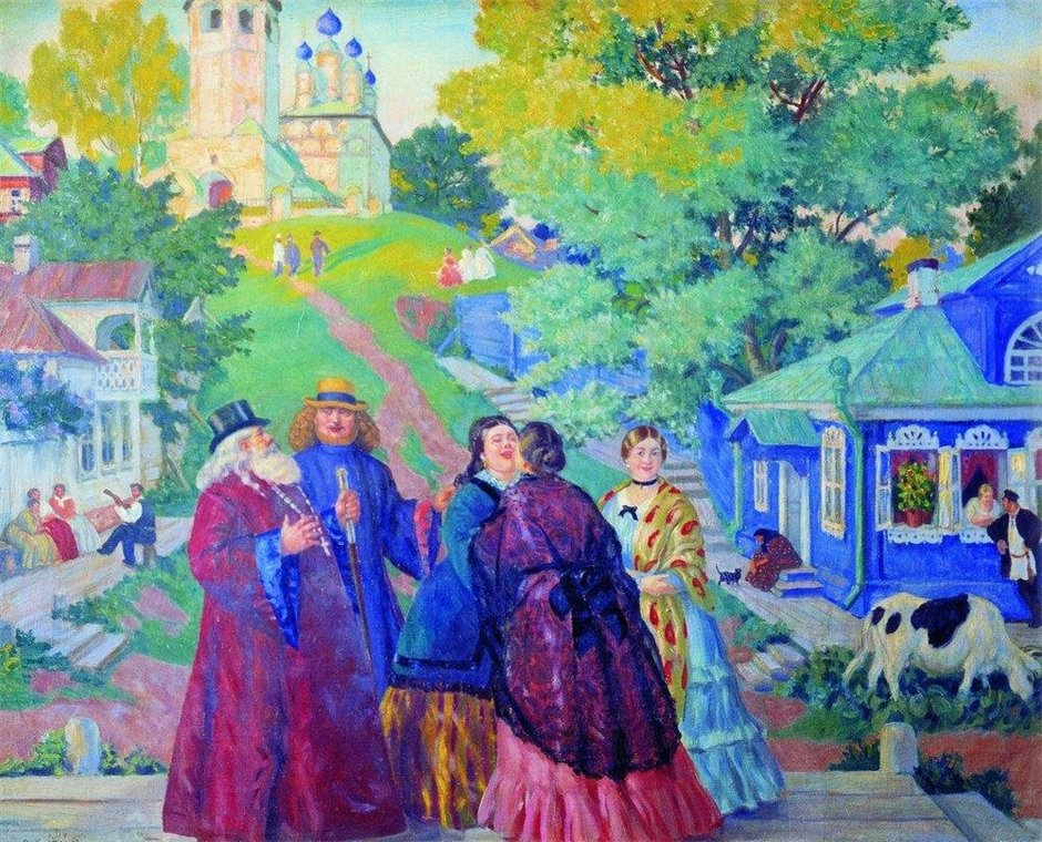 Кустодиев Борис Михайлович .Встреча (Пасхальный день). 1917.